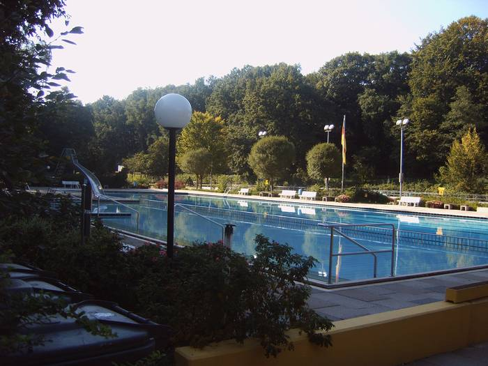 Schwimmbad Bruchhausen-Vilsen